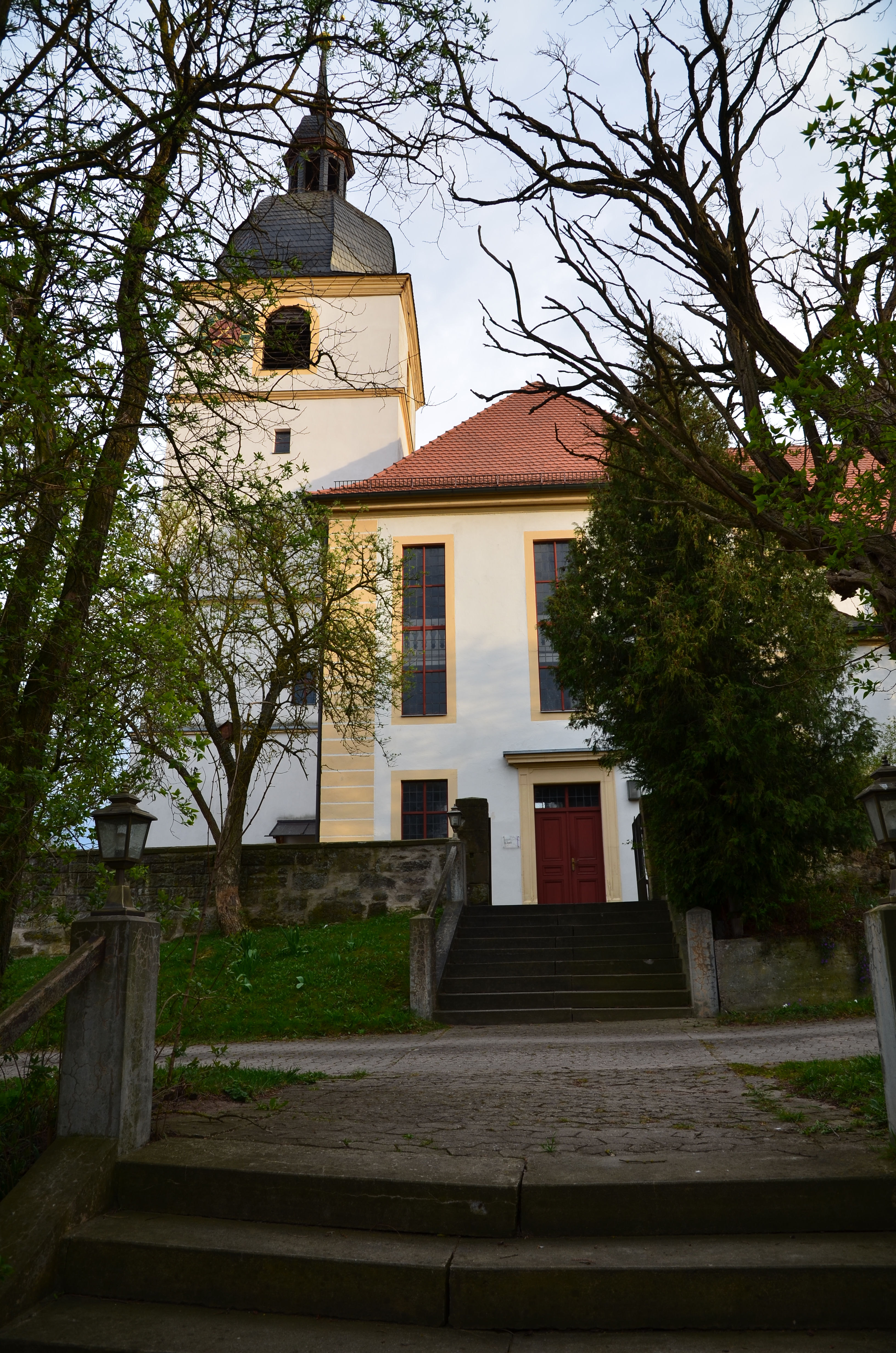 evang.-luth. Kirche St. Erhard in Sugenheim